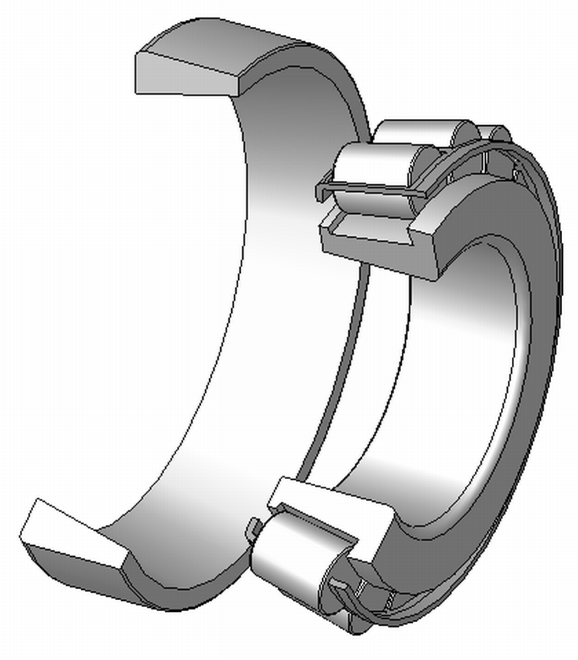 Kegelrollenlager, mit Blechkaefig aus Stahl, zerlegbar, Explosionsdarstellung, 120°Schnitt, Hinweis: Innenaufbau des Lagers (insbesondere des Kaefigs) variiert je nach Hersteller und Baugroesse rolling contact bearings